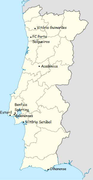 carte des clubs participants du championnat du portugal de football de premiere divison 1944-1945